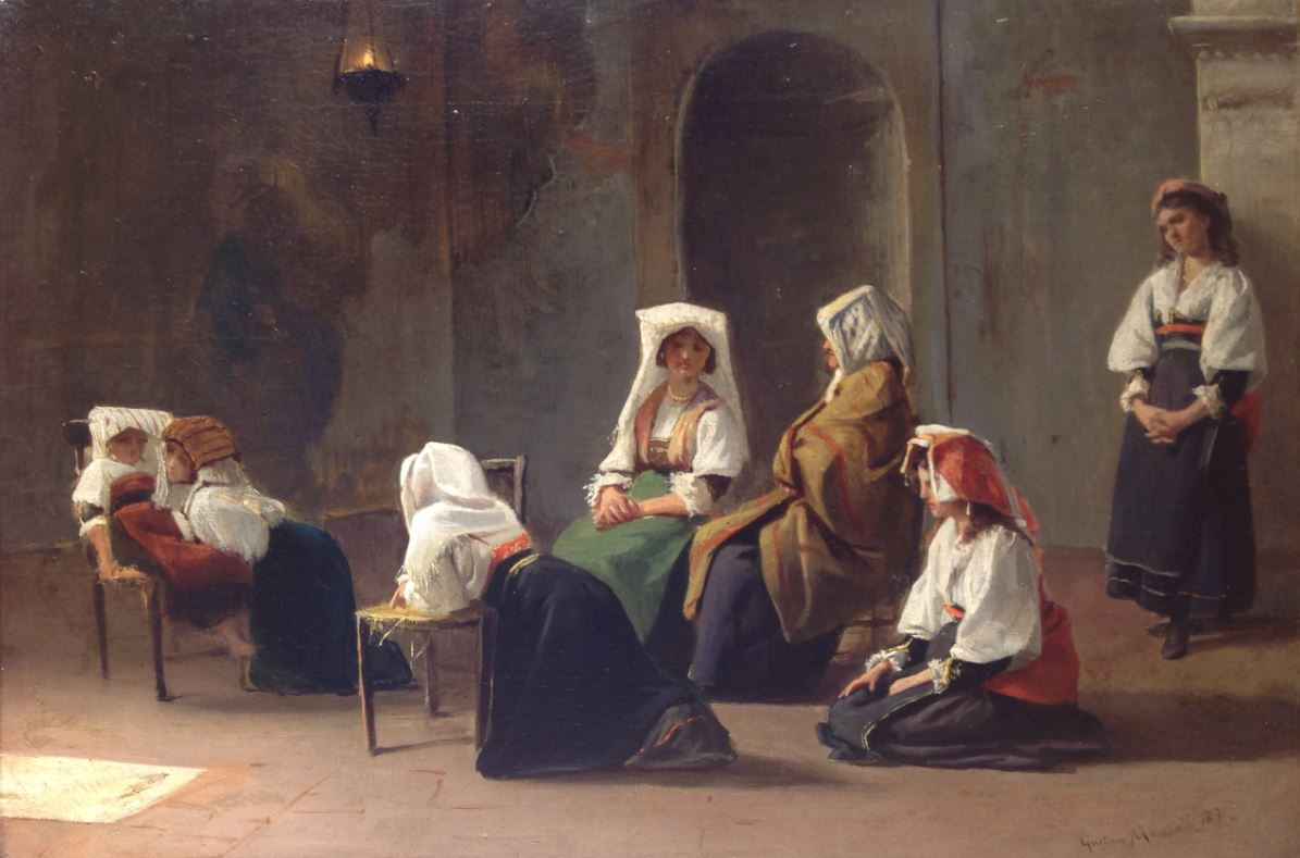 Dans l'église, tableau de Giuseppe Mancinelli (1813-1875), coll. part.